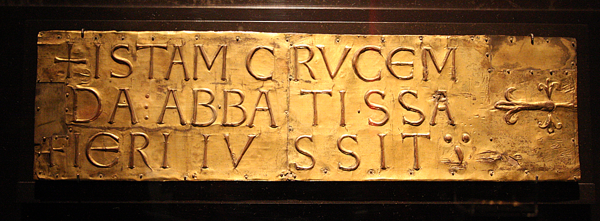 Sonderausstellung „Gold vor Schwarz“ auf Zollverein, Exponate der Essener Domschatzkammer in der ehemaligen Kohlewäscherei. Inschriftenplatte des Ida-Kreuzes